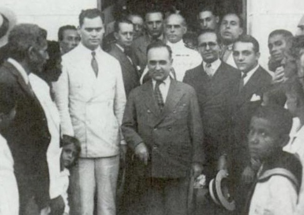 Ao centro: Juarez Távora, Getúlio Vargas e o então Interventor da Bahia, Juracy Magalhães. Fotografia tirada um ano após a Revolução de 1930.